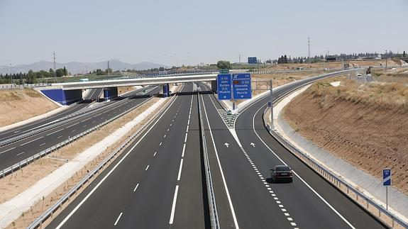 Segunda circunvalación de Granada a su paso por Albolote.